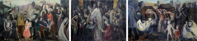 Renate Niethammer bekam Anfang der 1960er Jahre von der evangelischen Kirche den Auftrag, ein Altarbild für die evangelische Kirche im Dorf Selchow (nahe Storkow) zu malen. Der thematische Hintergrund für das angeforderte Bild war ein Vers aus der Bibel, Matthäusevangelium, Kapitel 11, Vers 28: „Kommt her zu mir, alle, die ihr mühselig und beladen seid, ich will euch erquicken“ Das Gemälde wurde als Triptychon gefertigt. Die Bilddaten sind: Ölfarbe, Außenteile zu je 150 x 90 cm, Mittelteil 120 x 90 cm, signiert von R. Niethammer, 1965. Das Gemälde zeigt Jesus inmitten einer großen Menge von Menschen in den verschiedensten Situationen ihres Lebens, es zeigt Frauen, Kinder, Männer, arme, junge, alte, kranke, gesunde Menschen und auch den Tod. Ein leicht lächelnder Jesus macht keinen Unterschied zwischen ihnen, er lädt alle ein zu ihm zu kommen, er will sie „erquicken“.